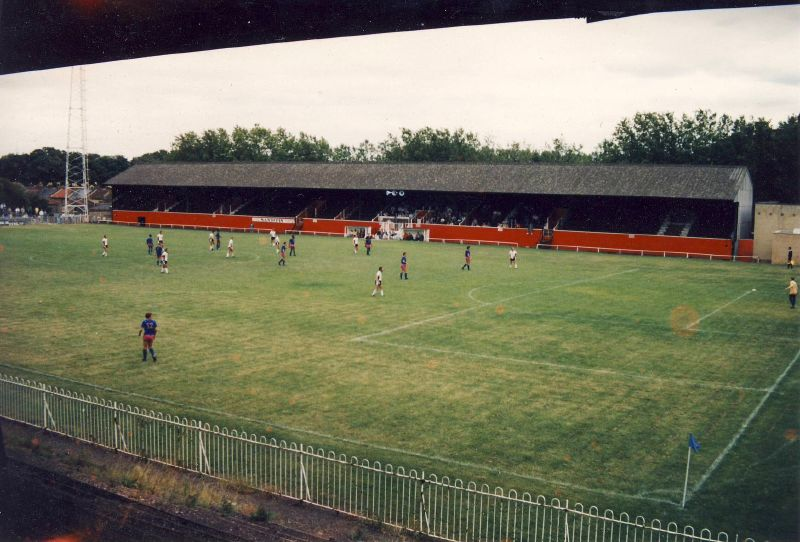 Dulwich Hamlet V Fulham